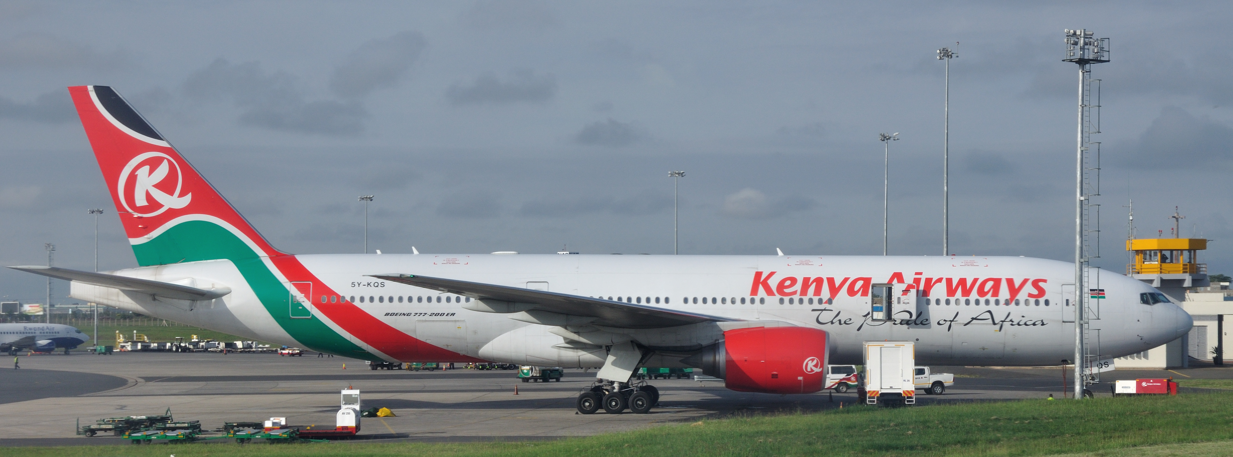 Kenya, Kenya Airways Boeing 777-200 ER 5Y-KQS at Jomo Kenyatta International Airport